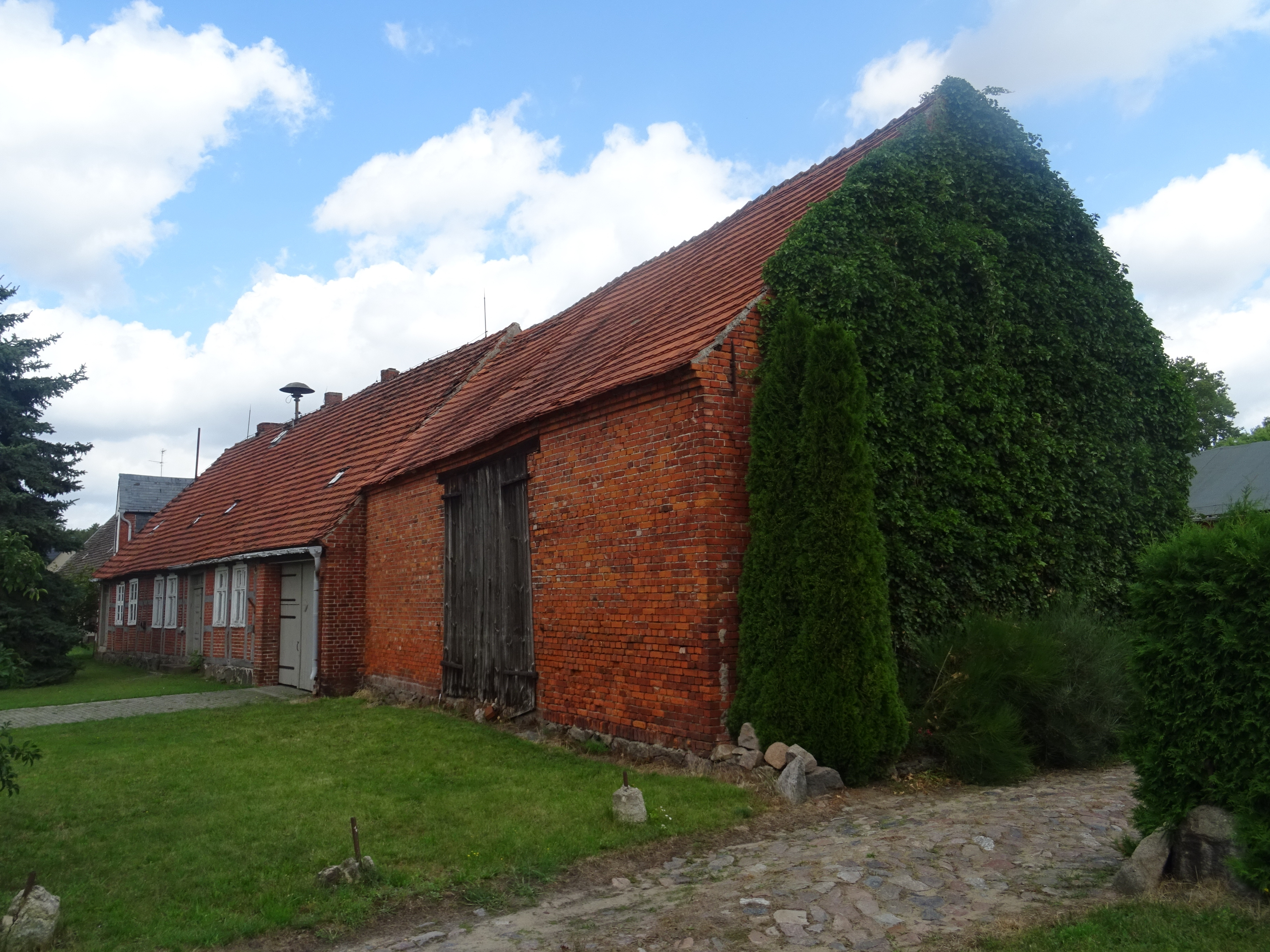 Steinberg, Gemeinde Groß Pankow, denkmalgeschütztes Gehöft Am Ring 9/10